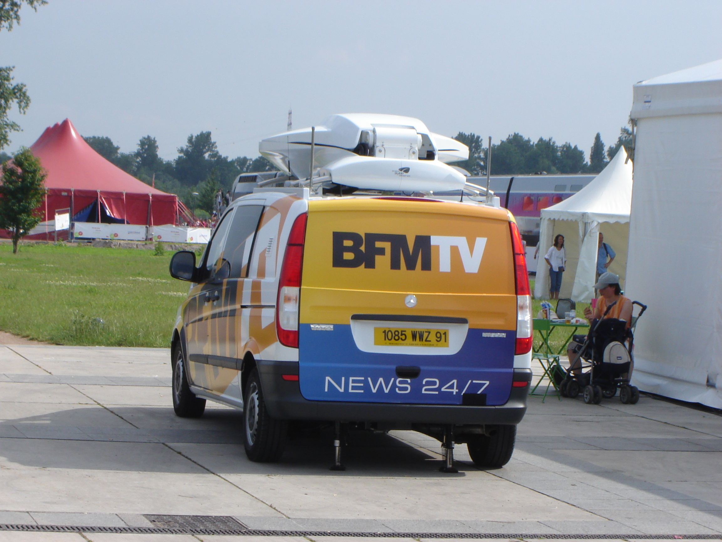 Camionnette de la chaîne d'information en continu française BFM TV lors des festivités de la LGV Est européenne au jardin des Deux Rives à Strasbourg en juin 2007.